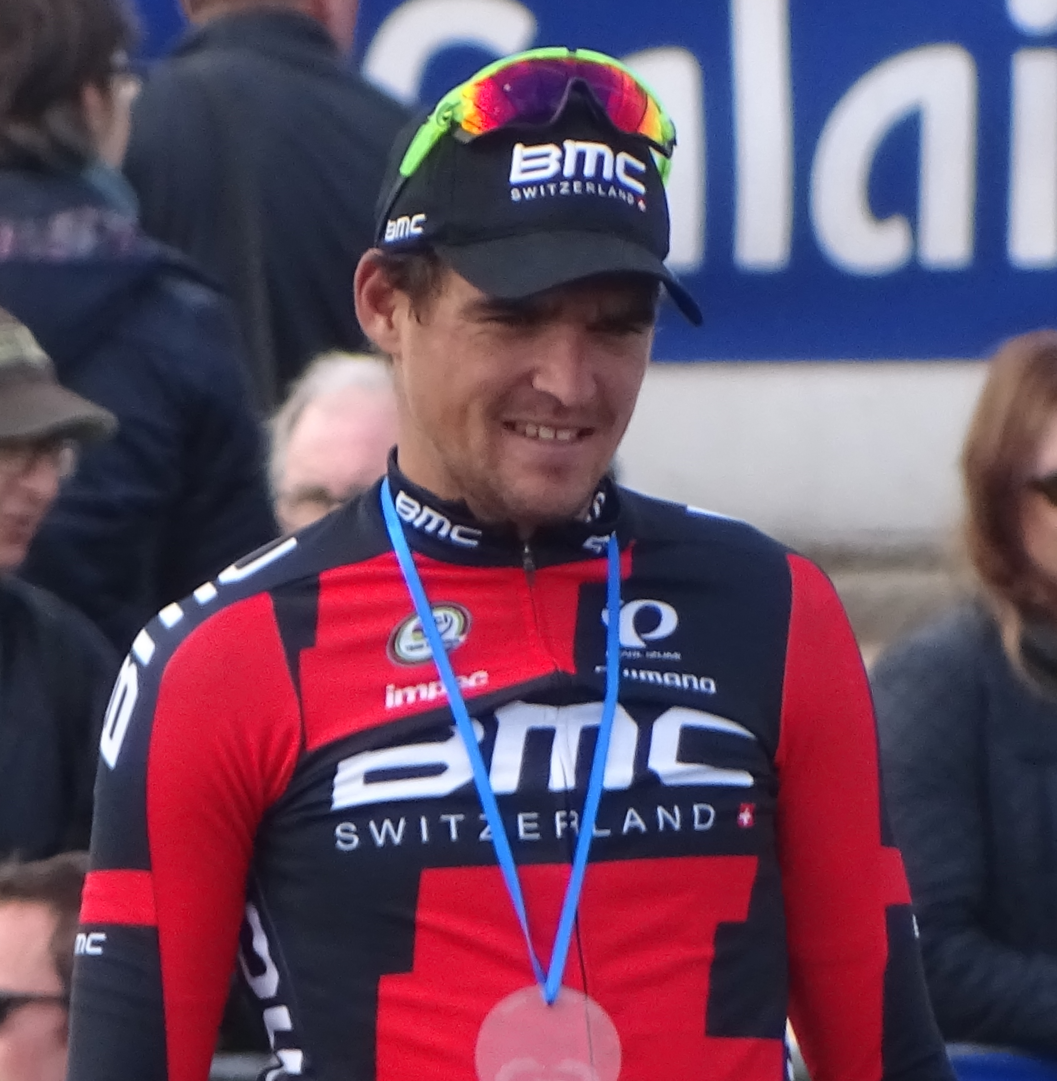 Reportage réalisé le dimanche 12 avril à l'occasion de l'arrivée du Paris-Roubaix 2015 à Roubaix, France.